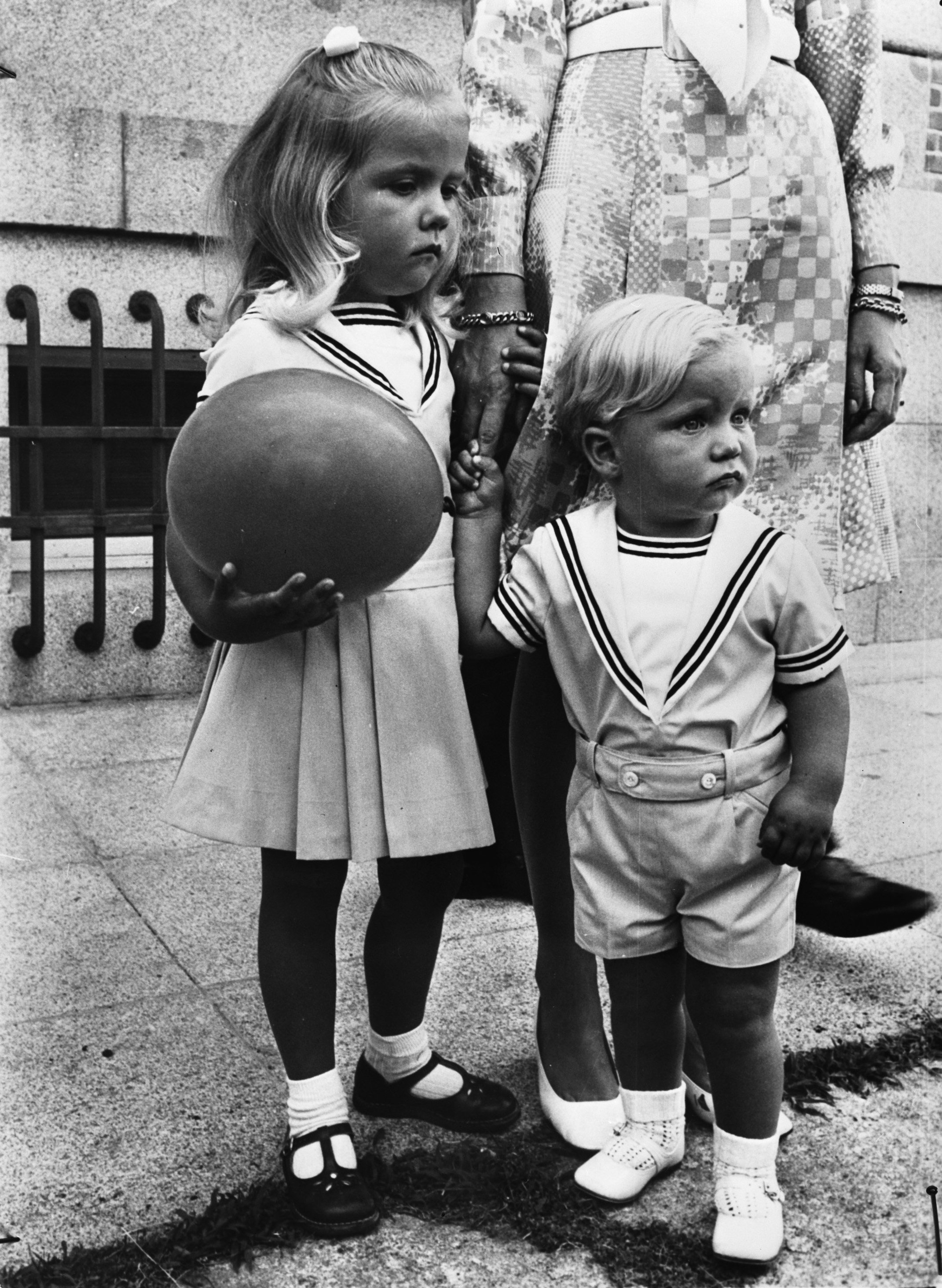 Collectie / Archief : Fotocollectie Anefo Reportage / Serie : Nieuwe opnamen van Prins Juan Carlos (Prins van Spanje) en familie Beschrijving : Prinses Christina en Prins Felipe Datum : 1 augustus 1969 Locatie : Spanje Trefwoorden : prinsen, prinsessen Persoonsnaam : Christina, prinses, Felipe, prins van Spanje Fotograaf : [onbekend] Auteursrechthebbende : Nationaal Archief Materiaalsoort : Negatief (zwart/wit) Nummer archiefinventaris : bekijk toegang 2.24.01.04 Bestanddeelnummer : 922-6783